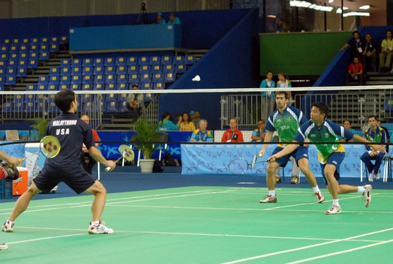 Rio de Janeiro - Badminton nos Jogos Pan-americanos de 2007. On picture: Guilherme Kumasaka, Guilherme Pardo and Bob Malaythong.